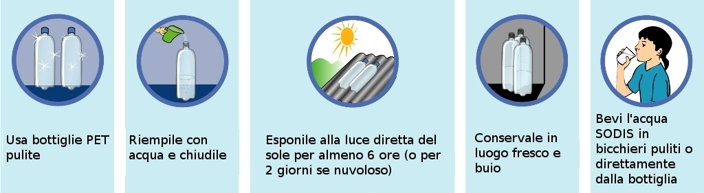 L'immagine illustra il metodo SODIS per disinfettare l'acqua da bere (disinfezione solare)